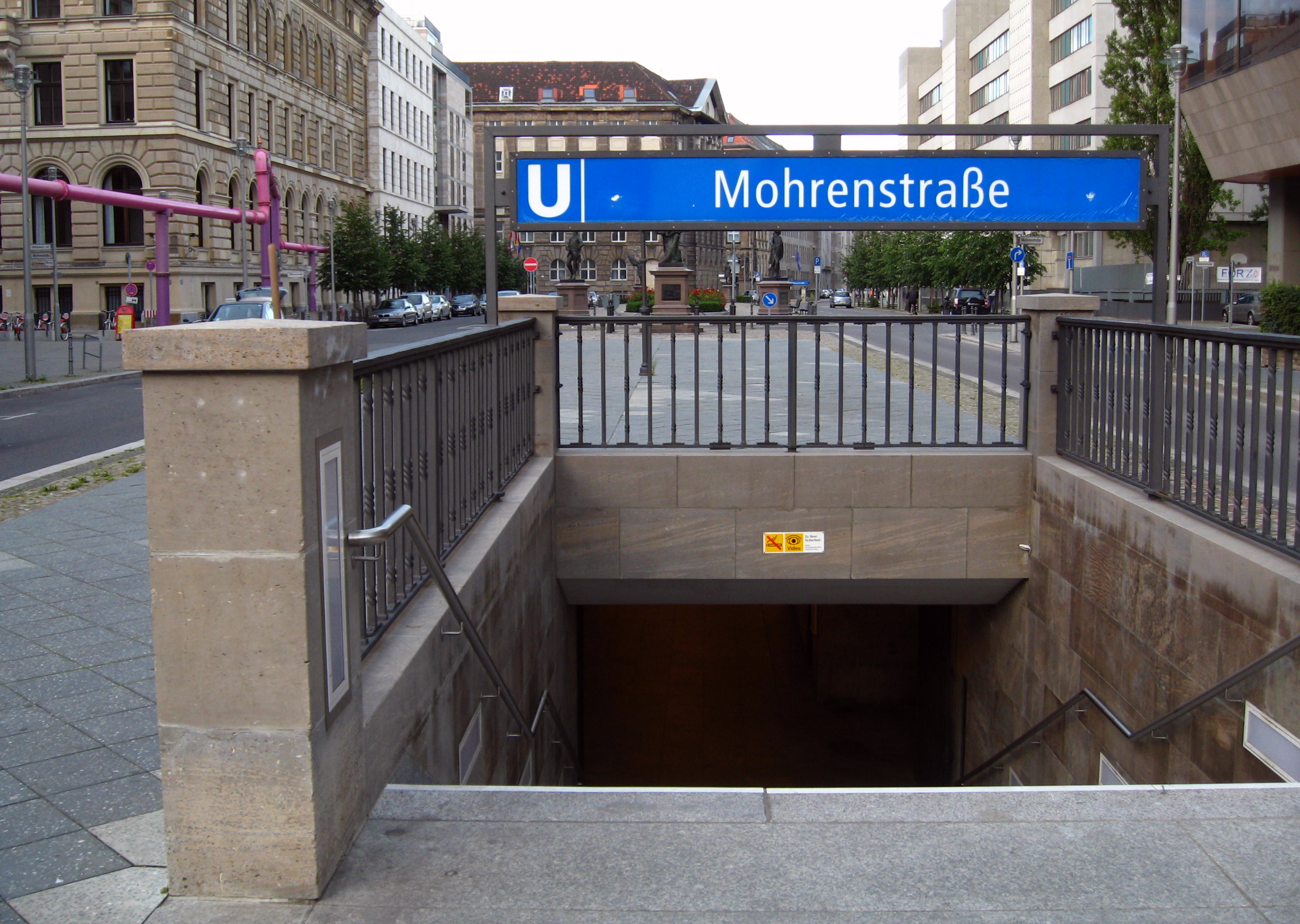 U-Bahnhof Mohrenstraße (Berlin)